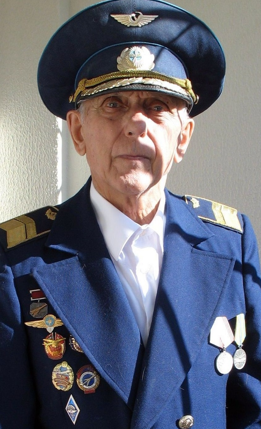 Беларуская (тарашкевіца): End_Gl-shturman_RB